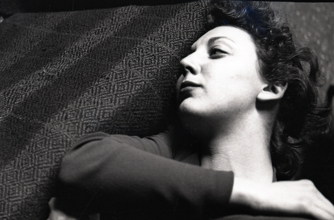 Località non identificata [Piemonte, Anzola d'Ossola?]. Ricerche personali: ritratti di donna. Serie fotografica : Anzola d'Ossola, 1970 / Paolo Monti. - Strisce: 3, Fotogrammi complessivi: 10 : Negativo b/n, gelatina bromuro d'argento/ pellicola ; 35 mm. - Sul portanegativi: [NIKMAT?] Ferrania Orto 18/10. - La donna ritratta potrebbe essere la moglie di Paolo Monti, Maria Binotti.